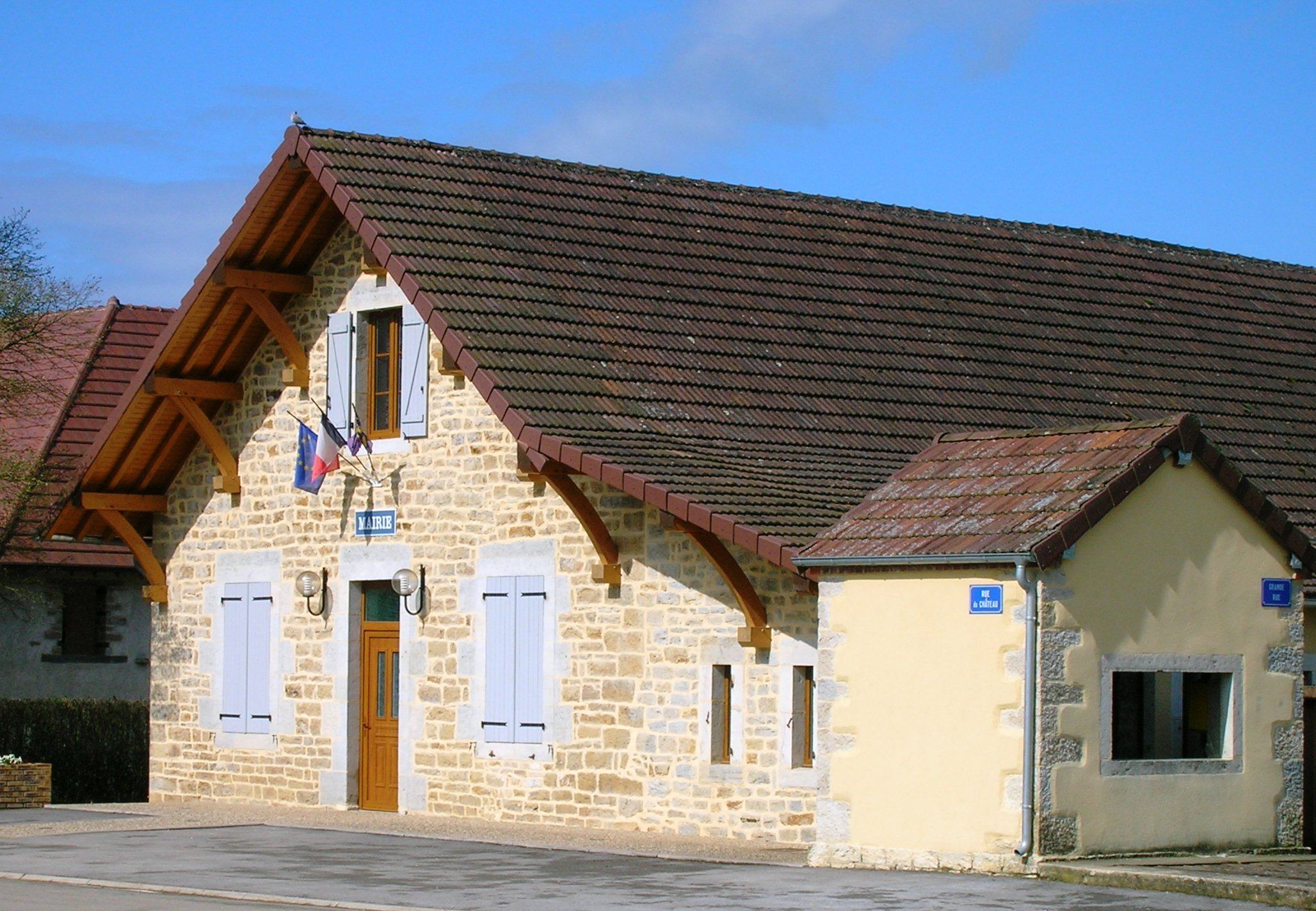 La mairie rénovée de la commune d'Oussières (Jura, France).